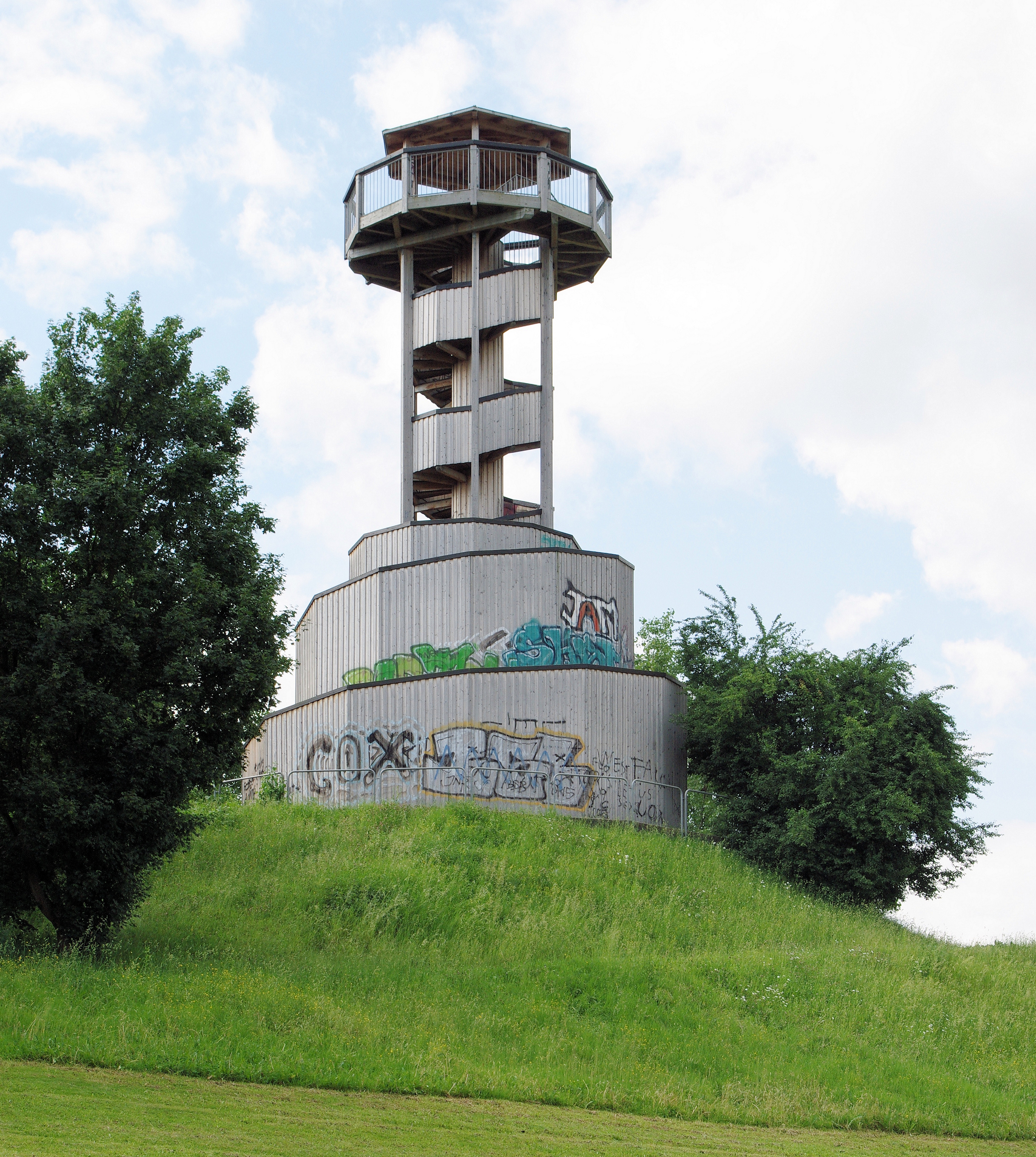 Der neu aufgebaute Seeparkturm